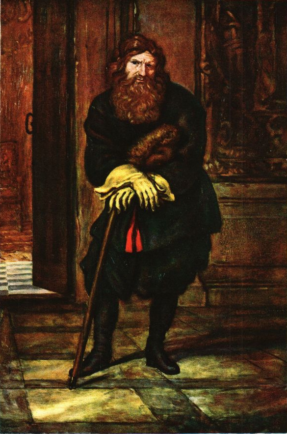 Per (Peder) Olsson från Gladhammars socken i Småland, bondeståndets talman på 1686 års riksdag. Statens porträttsamling på Gripsholm.